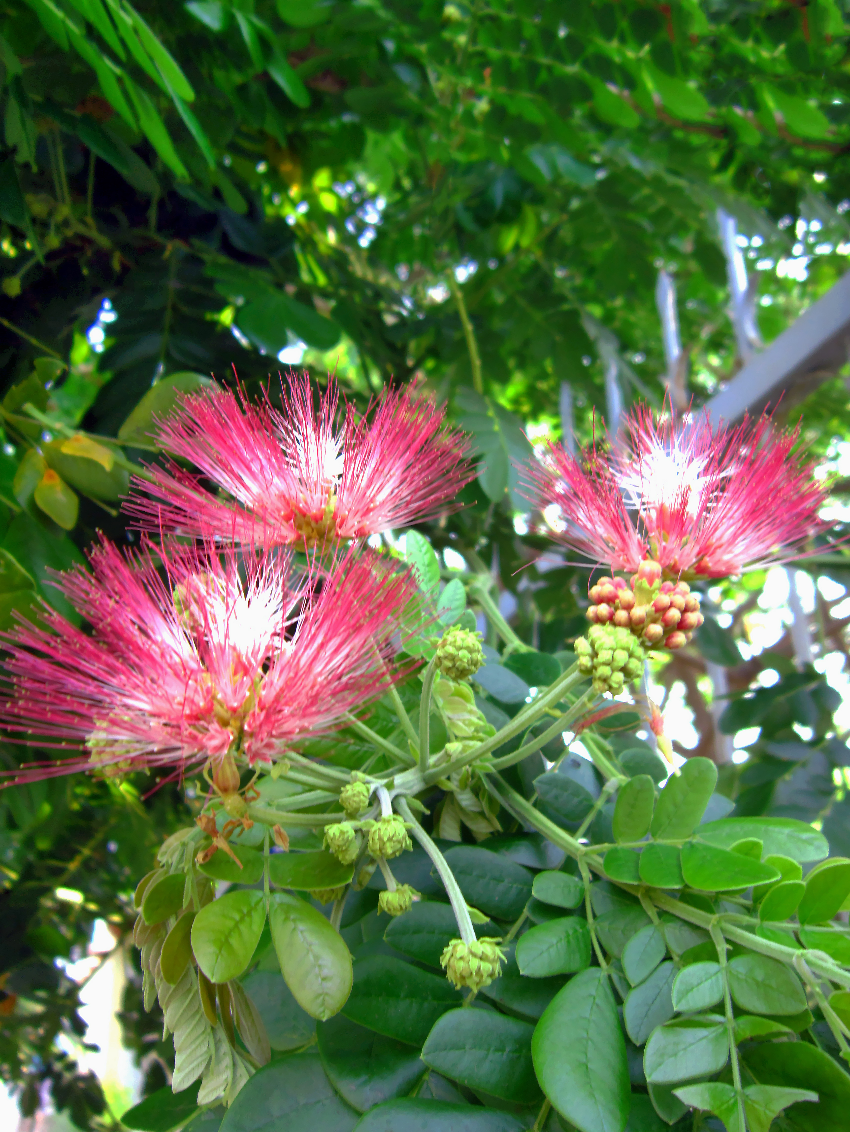 Hoa Còng (Samanea saman) ở miền Nam Việt Nam.